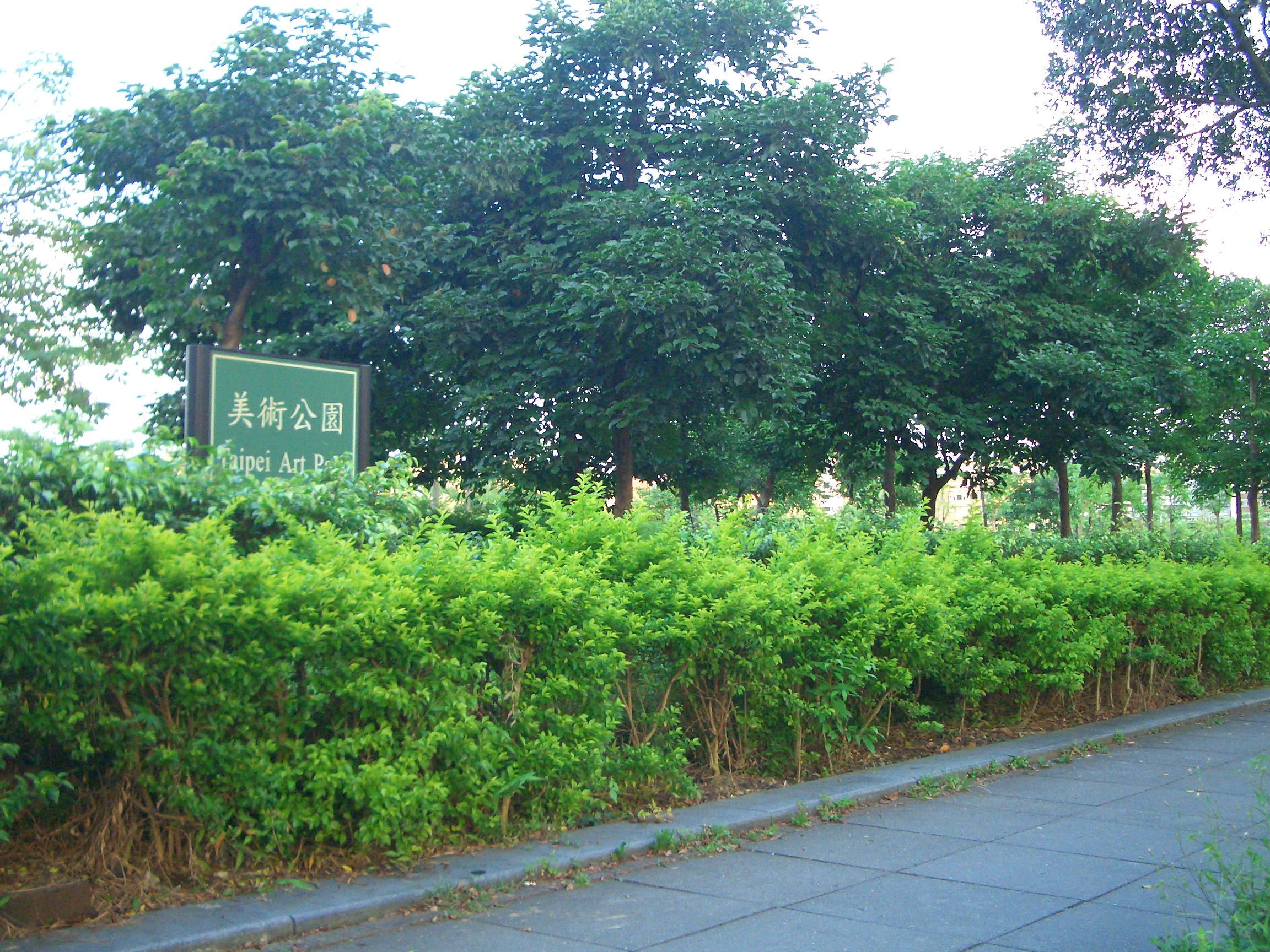 中華民國臺灣臺北市美術公園一景。